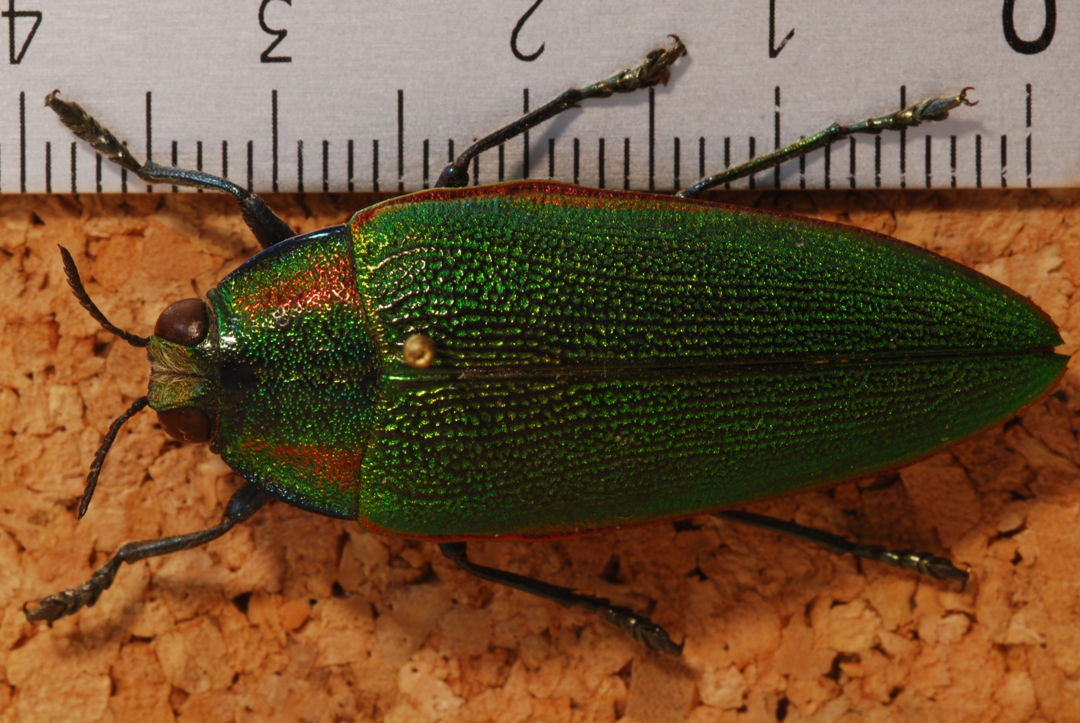 Uluguru Mounts, TANZANIA